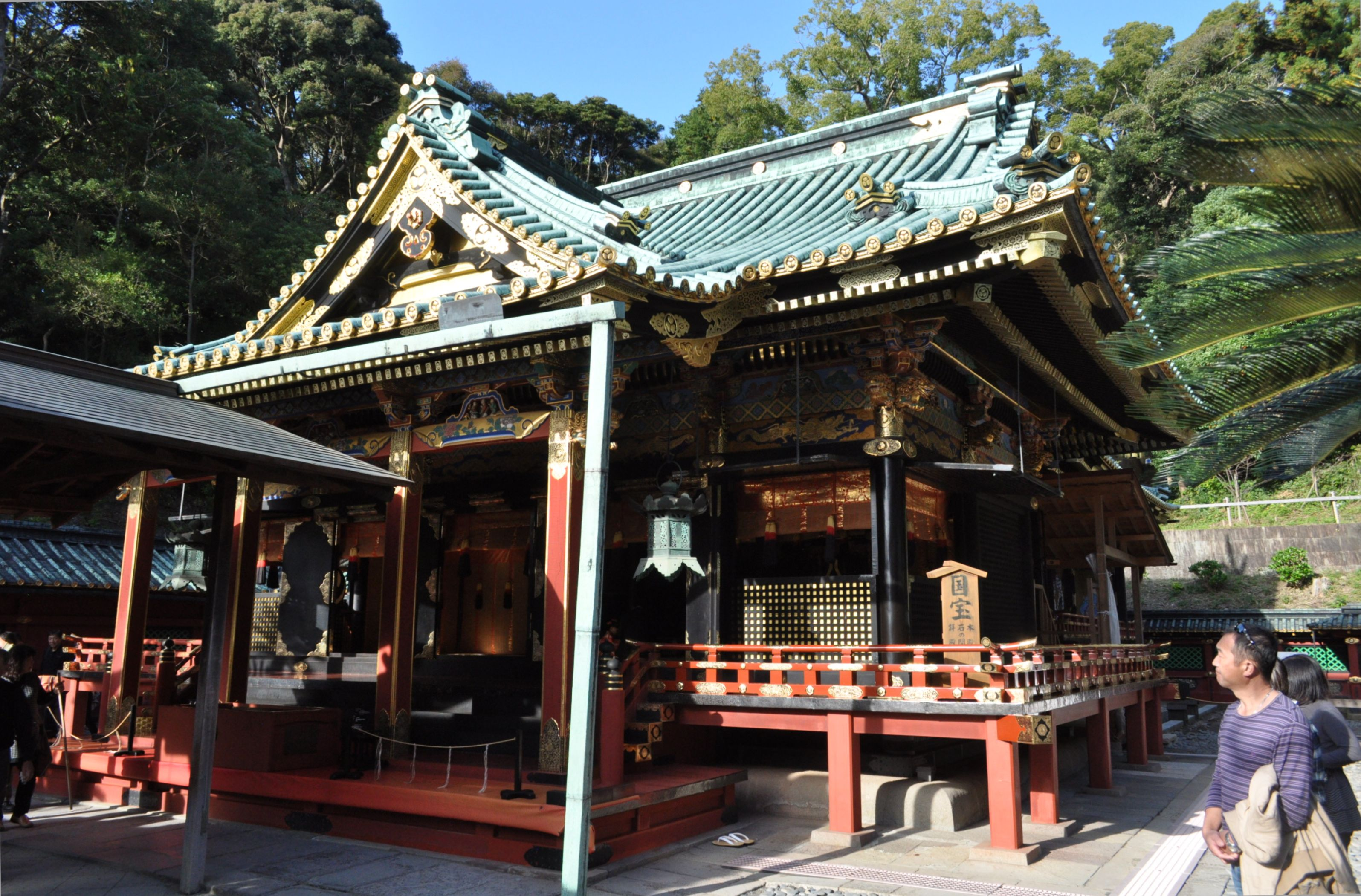 久能山東照宮